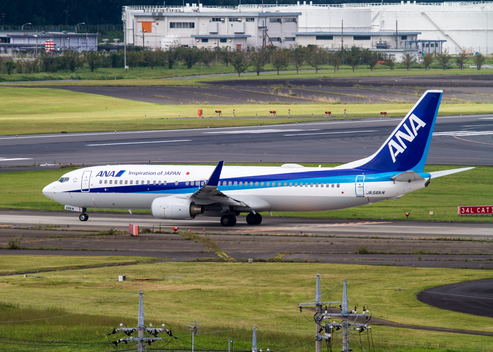 成田空港から離陸待ちの機体